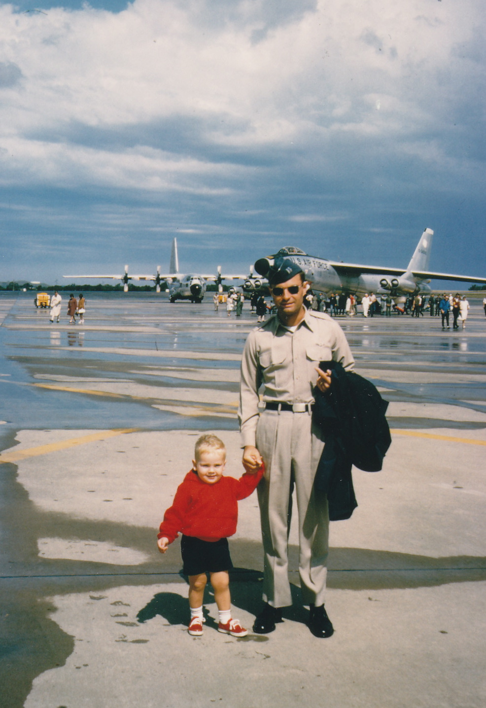 Wolfgang Samuel and son Charles taken in 1964 at Forbes AFB, Topeka, Kansa.